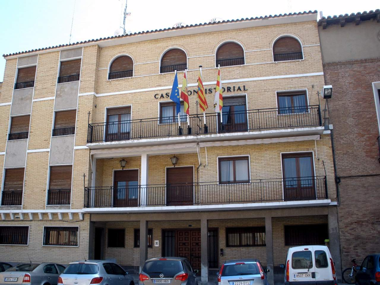 Ayuntamiento de Pedrola (Zaragoza, Aragón, España)